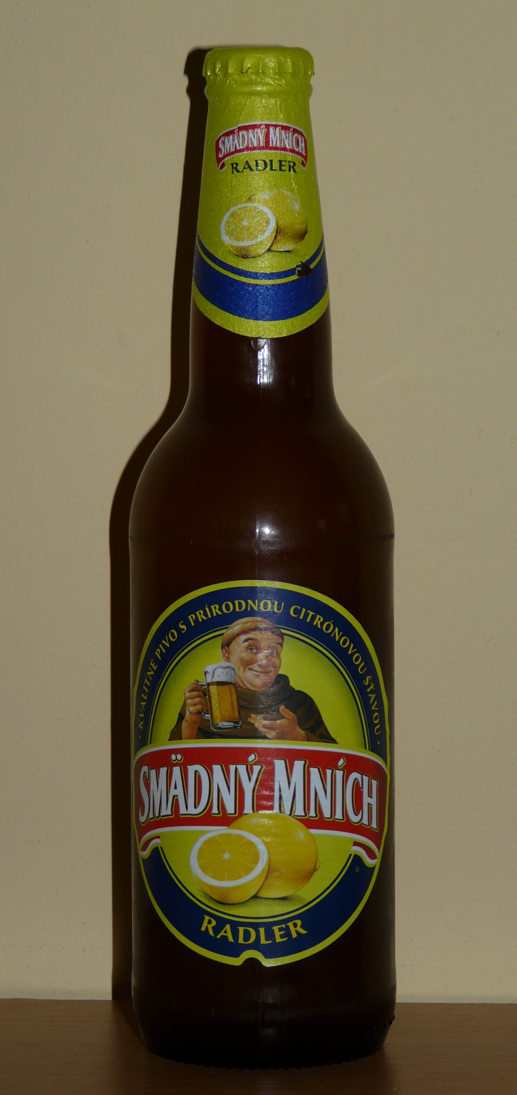 Butelka piwa Smädný mních Radler